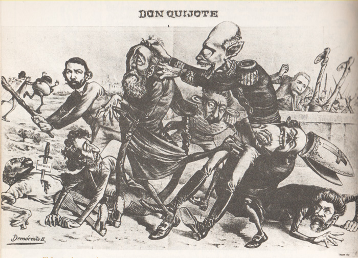 Edició satírica de la revista Don Quijote de la década de 1890 en donde están el arzobispo Aneiros, Roca, Saénz Peña y Mitre.